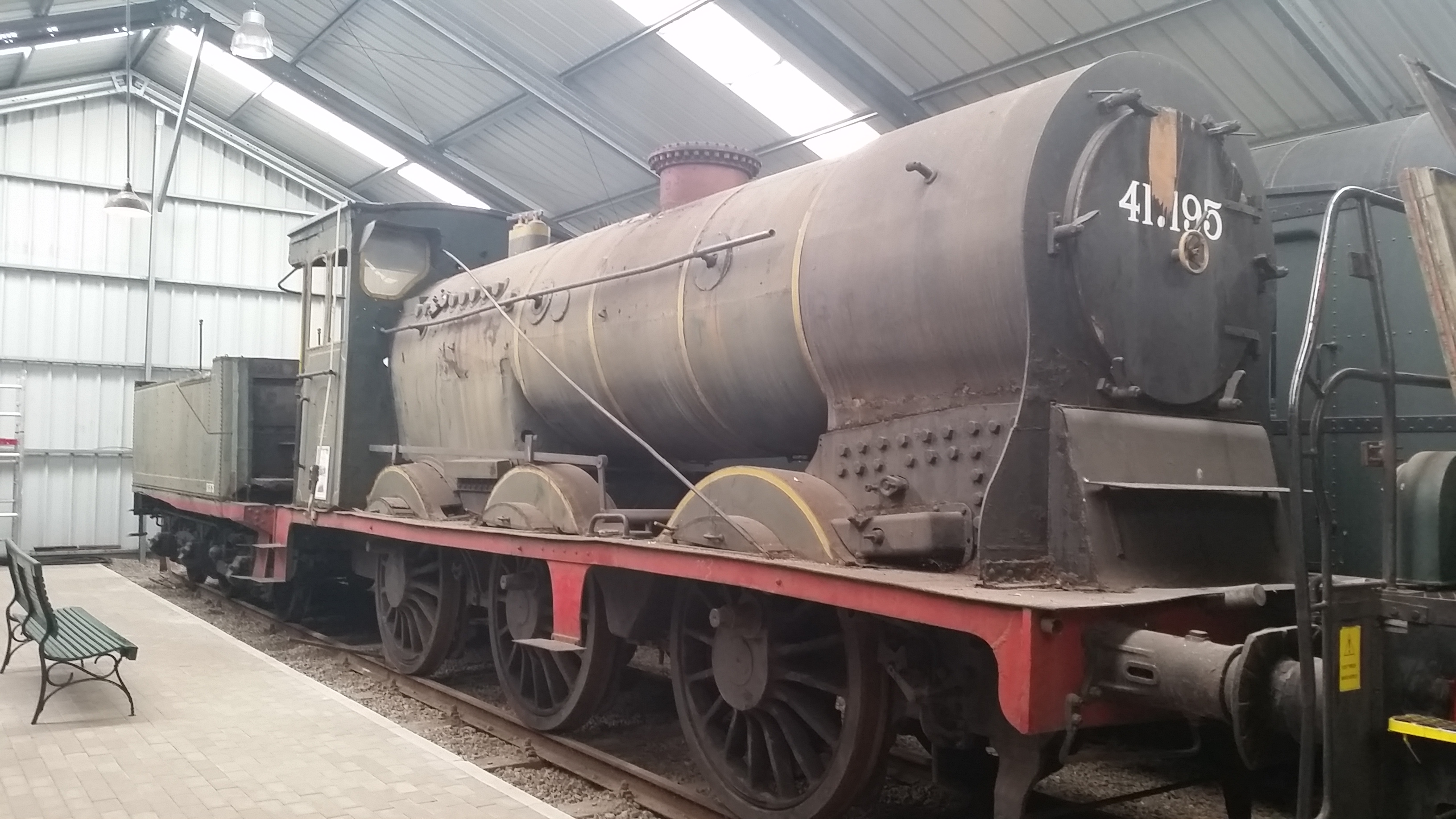 Foto gemaakt tijdens een Open Dag van het Stoomcentrum Maldegem in 2016.